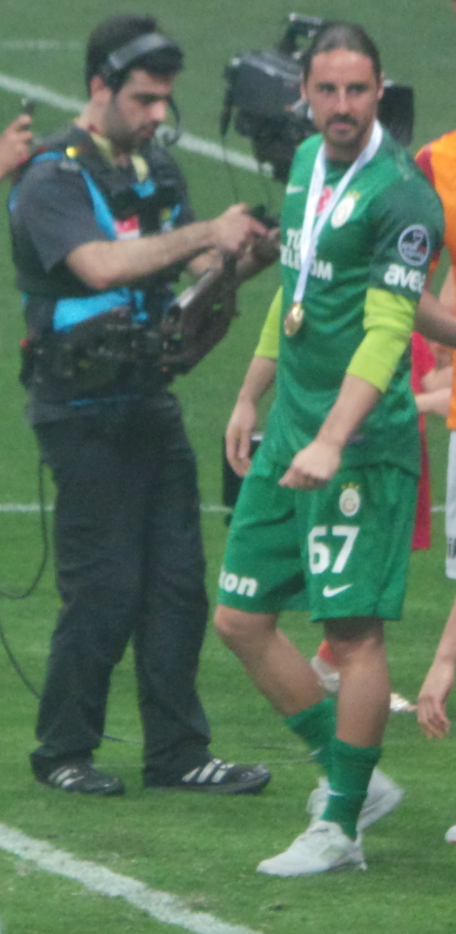 2012-13 Süper Lig